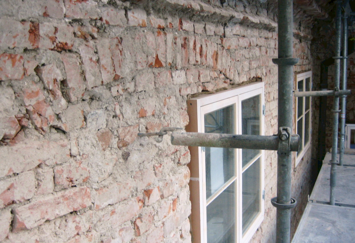 Putsrenovering Klevgränd, Katarina kyrkoback, visande en äldre muröppning med tegelvalv